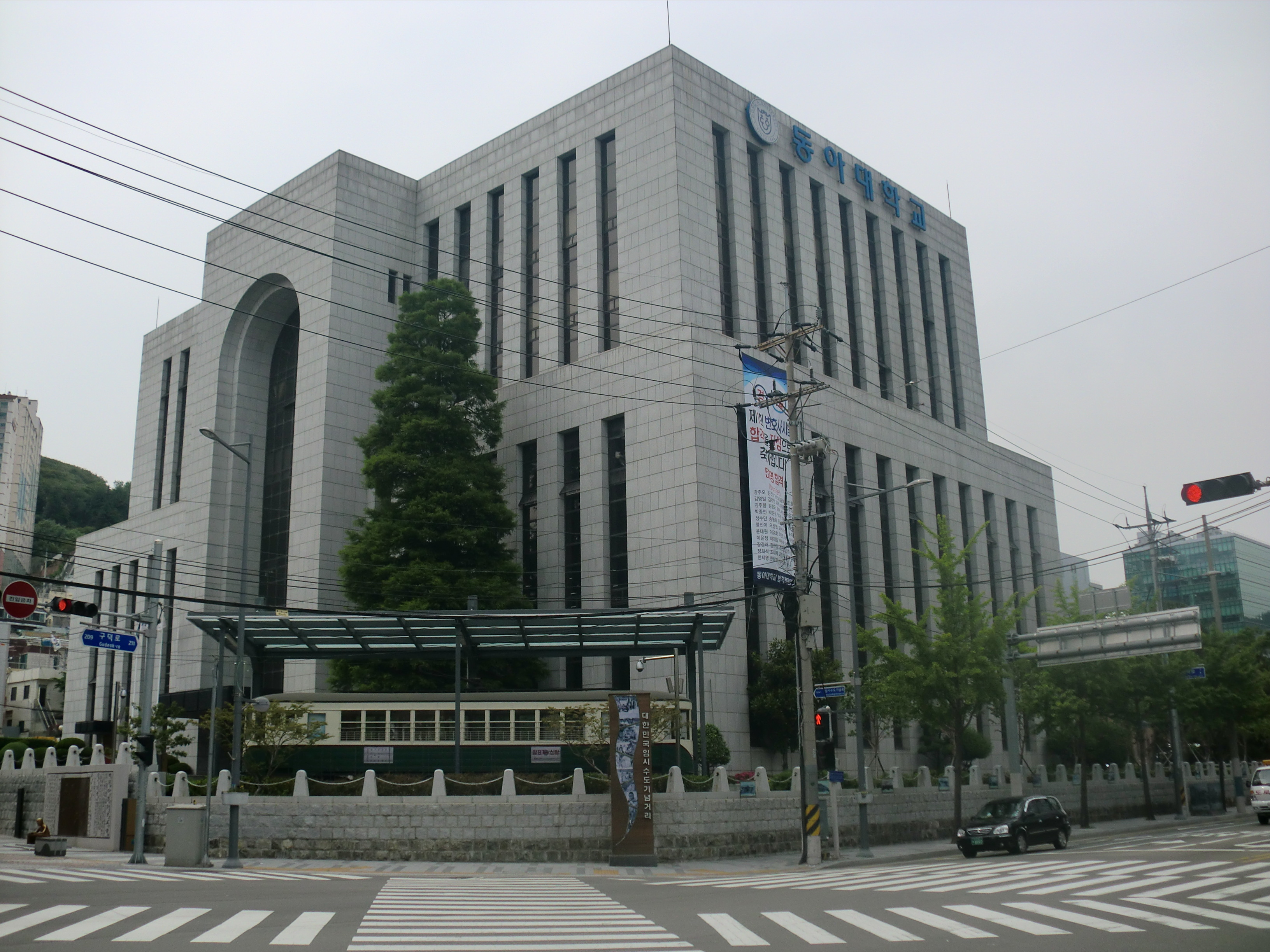 동아대학교 부민캠퍼스